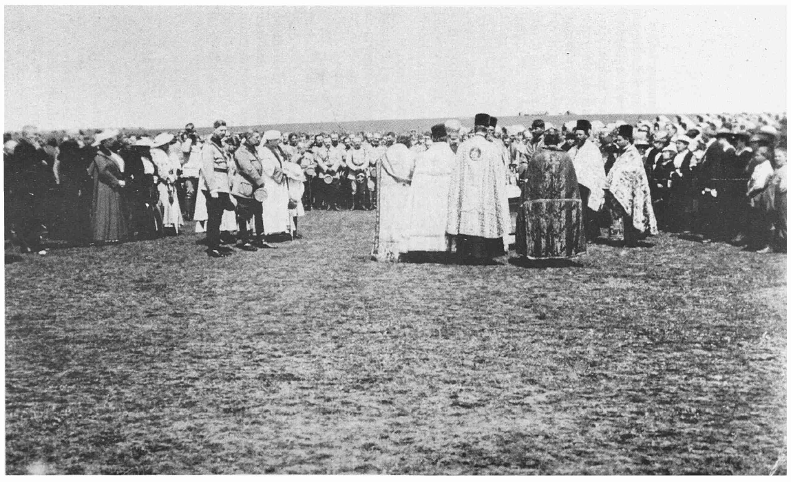 1917 - Familia regală şi Guvernul la sărbătorirea zilei de 10 mai la Iaşi, România